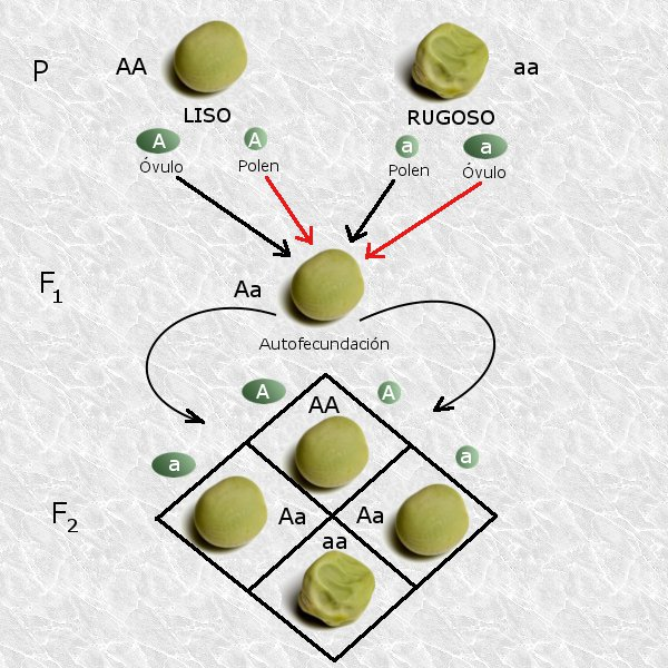 Esquema de un cruzamiento monohíbrido mendeliano